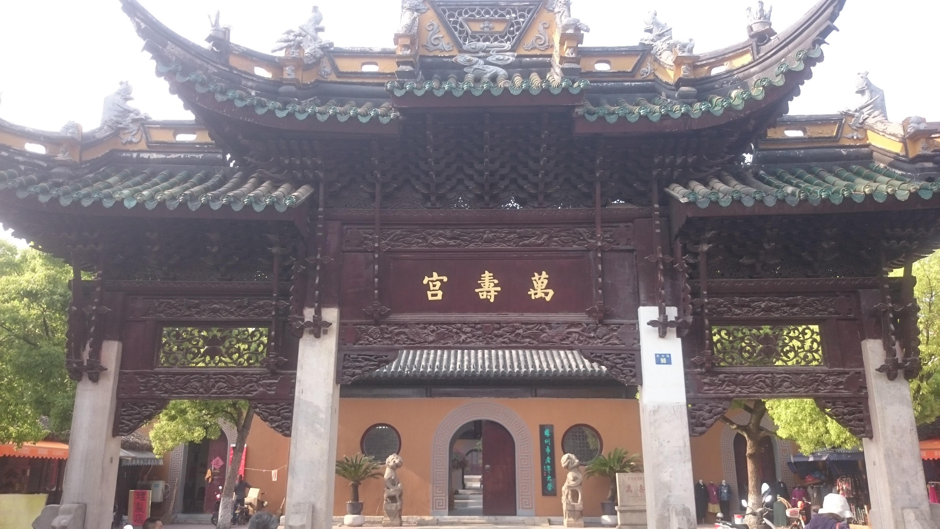 中文（中国大陆）: 苏州万寿宫 牌坊